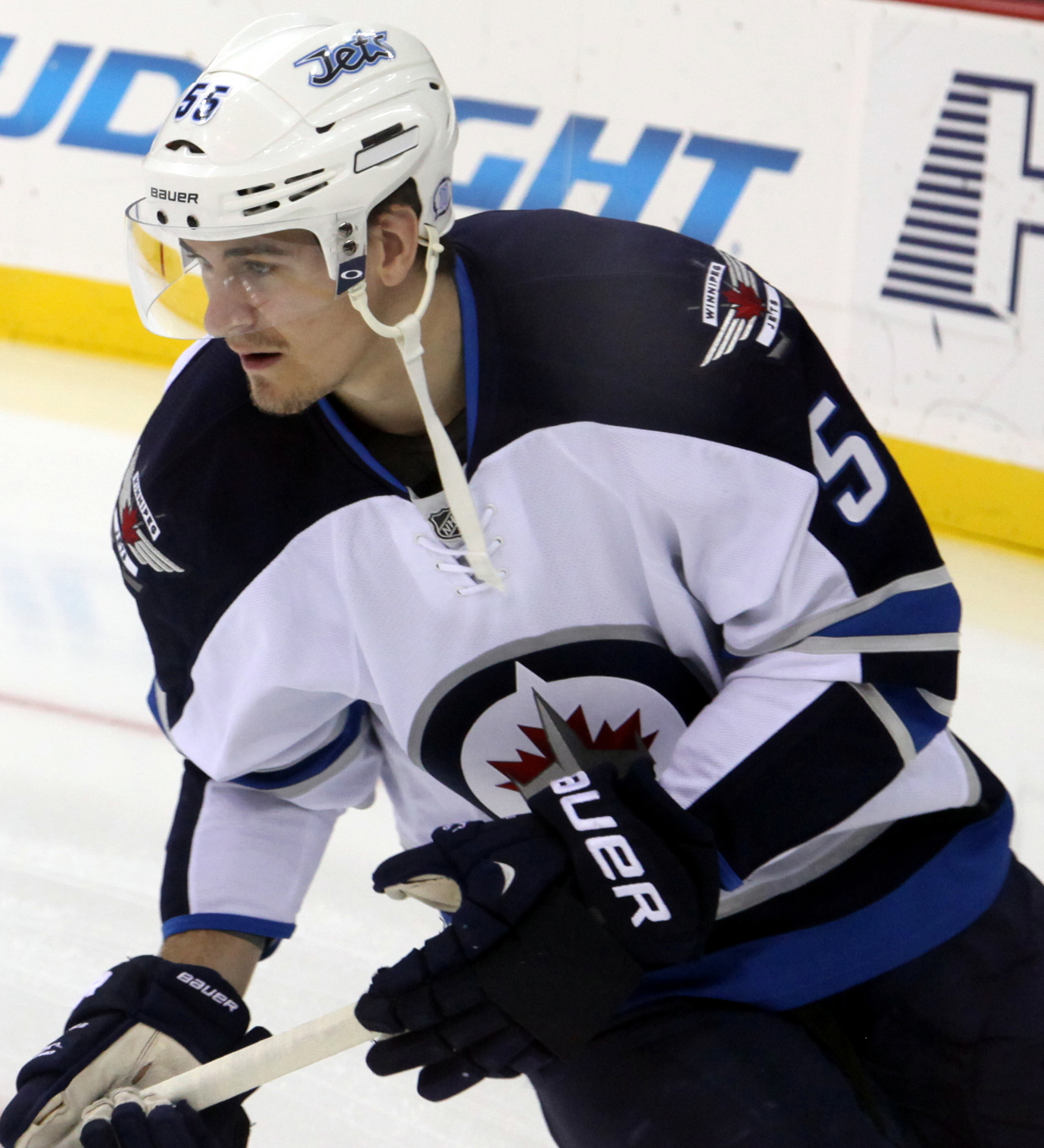 Scheifele in October 2014.